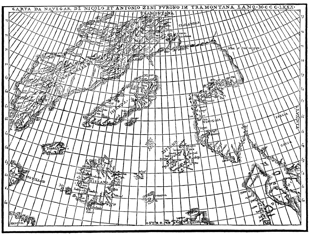 Kartan från Zeno.